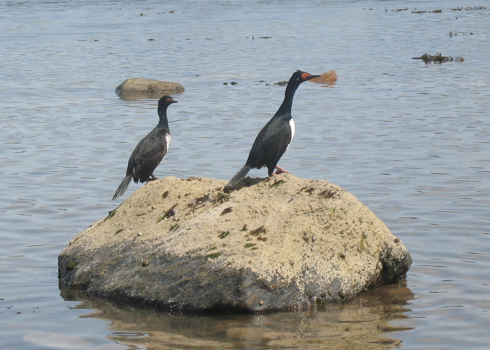 Cormoranes de cuello negro (Phalacrocorax magellanicus) en la costa del canal Beagle, Tierra del Fuego (Argentina)